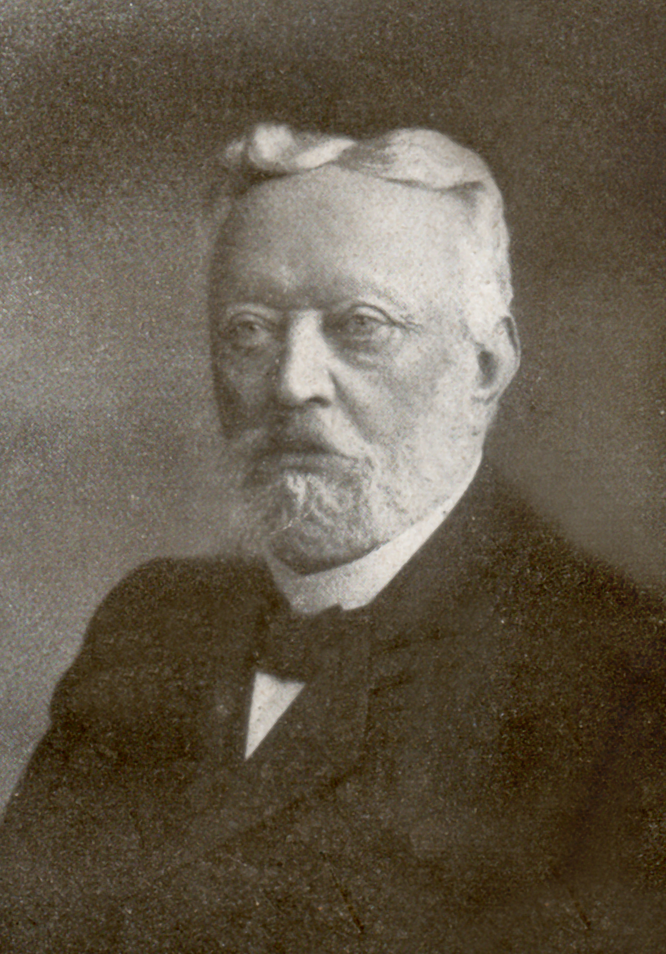 archaeologist